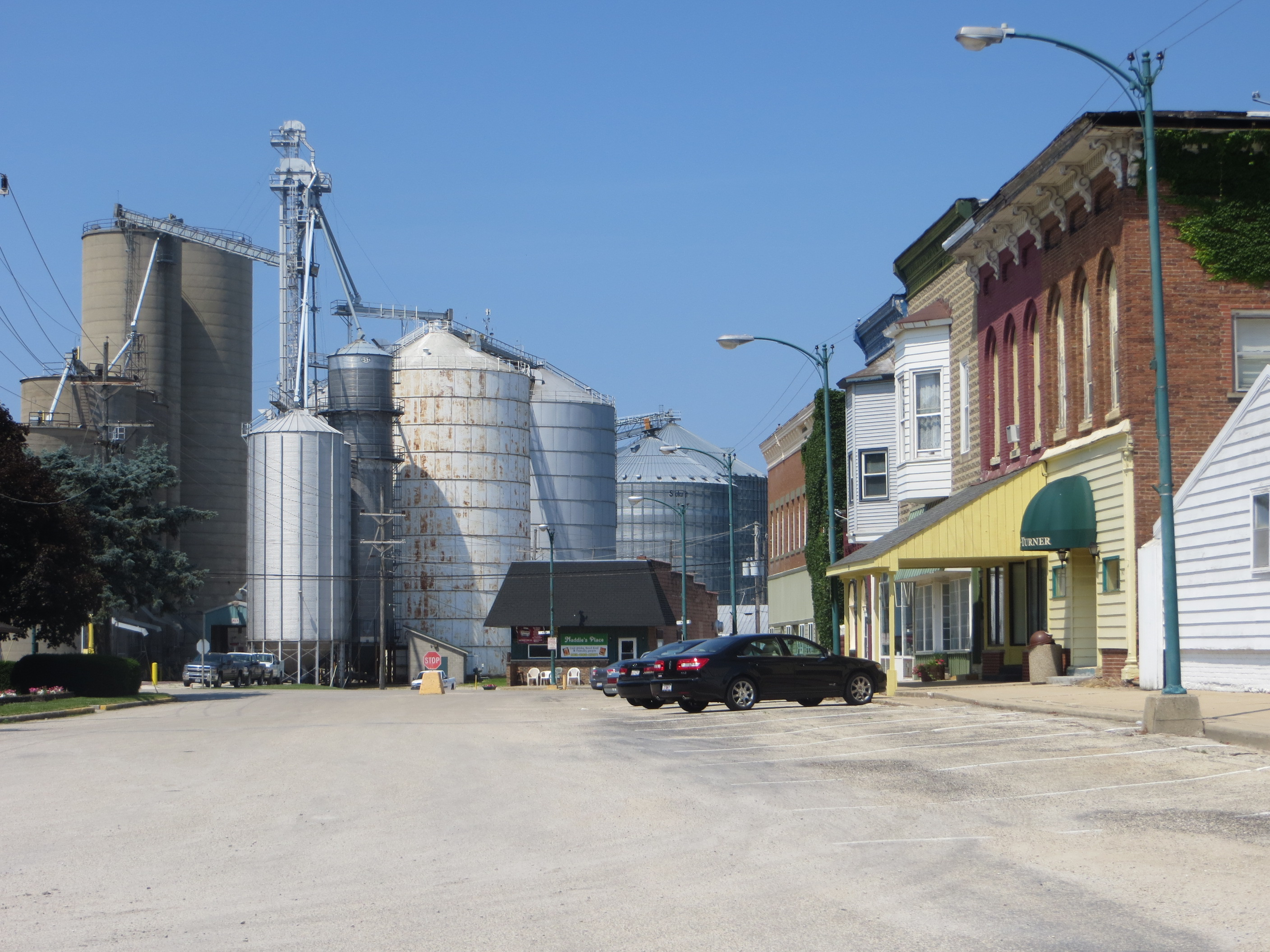 Railroad Avenue in Leland, Illinois.